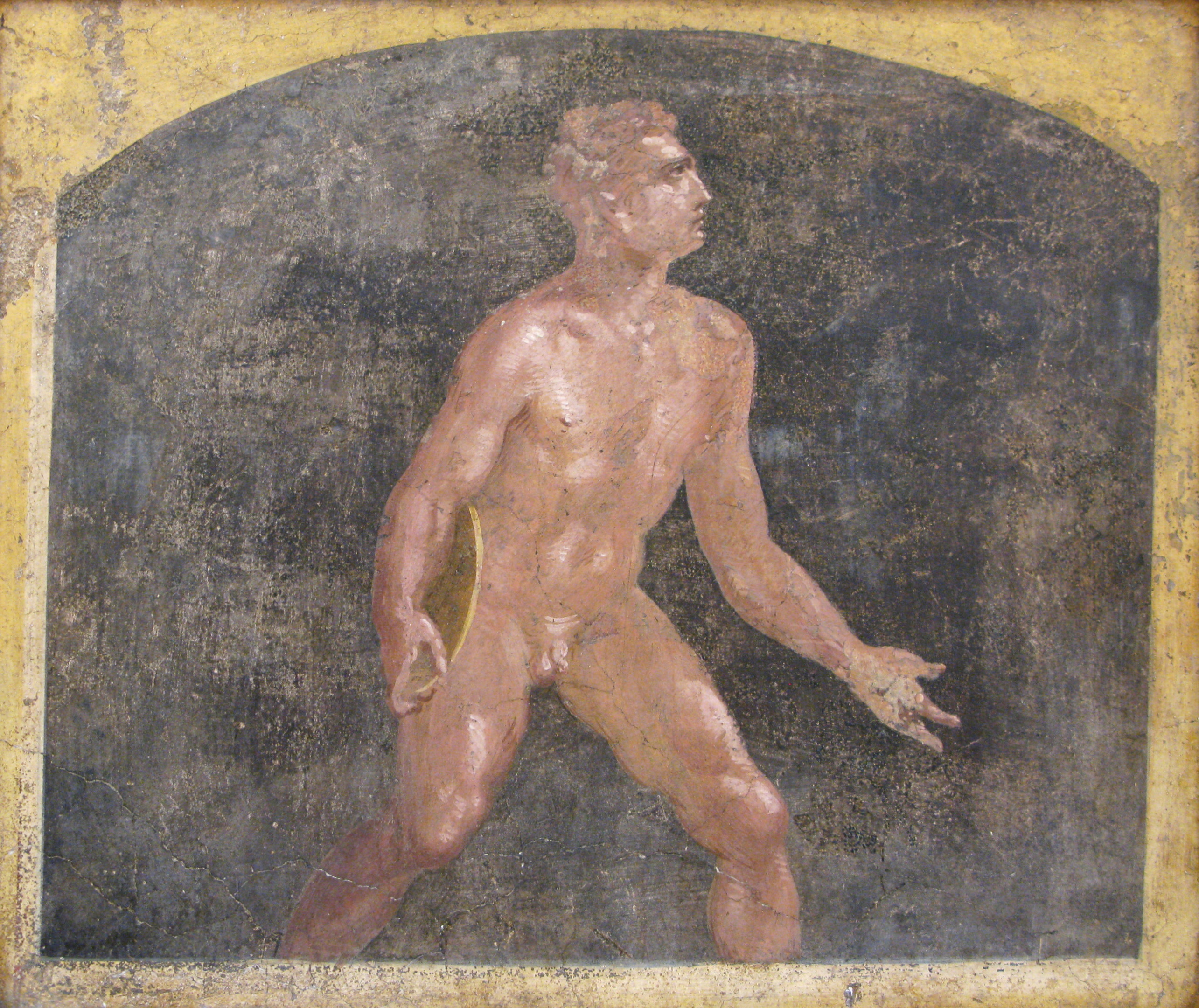 Discobolo, Museo archeologico nazionale di Napoli (inv. nr. 9053), da Stabiae, Villa di Arianna, anticamera.